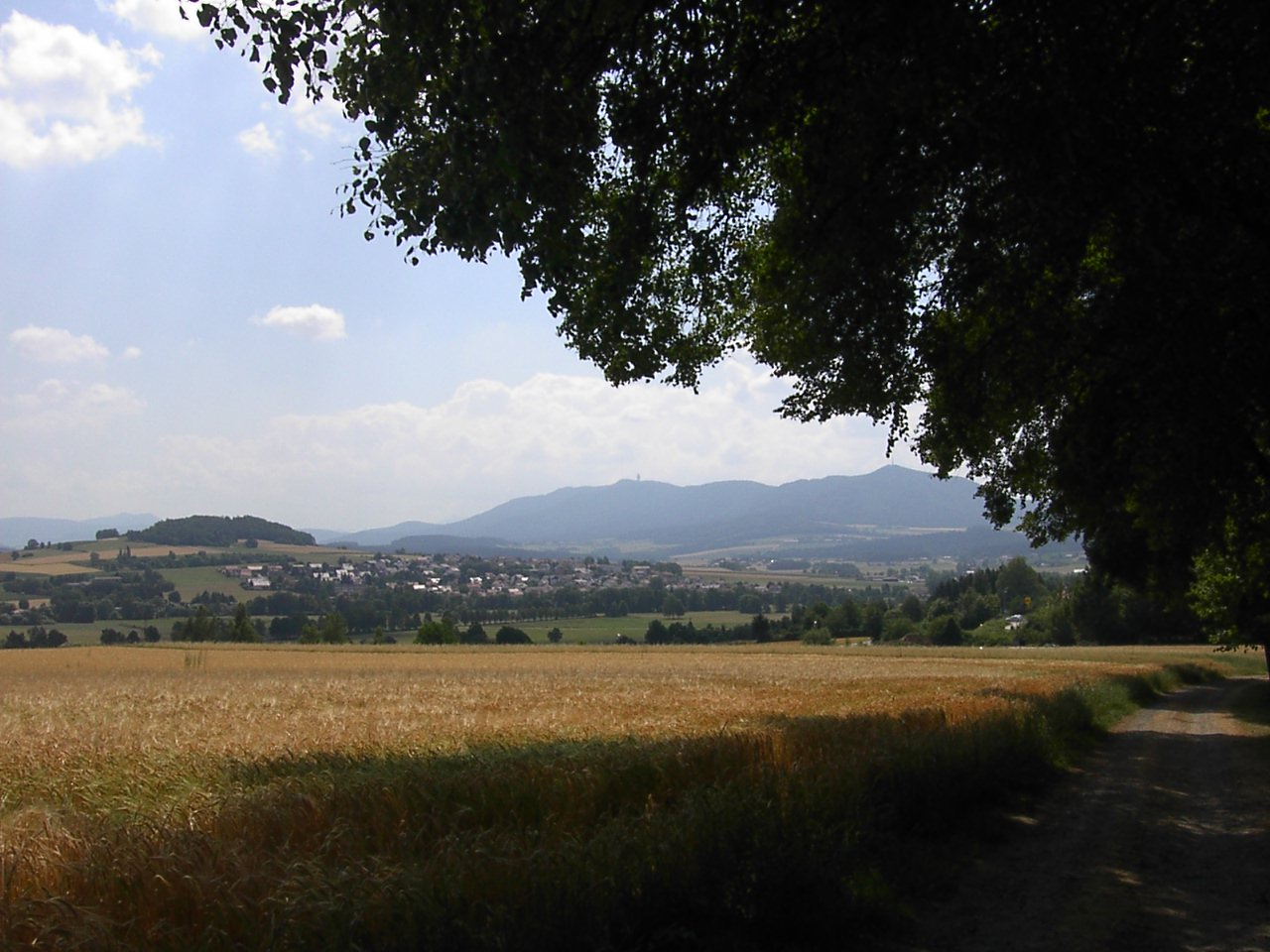 Furth im Wald von Norden